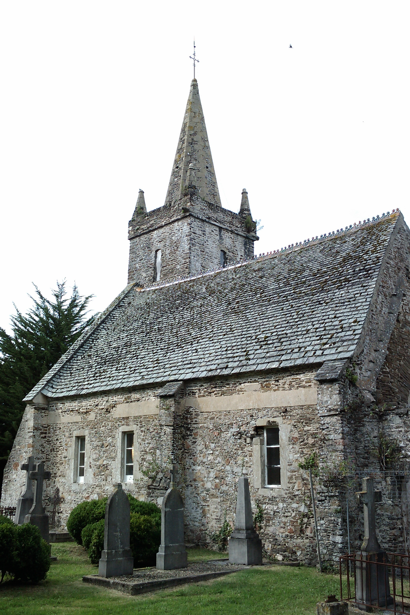 chapelle seigneuriale Saint-Louis de Barneville-Carteret église protestante